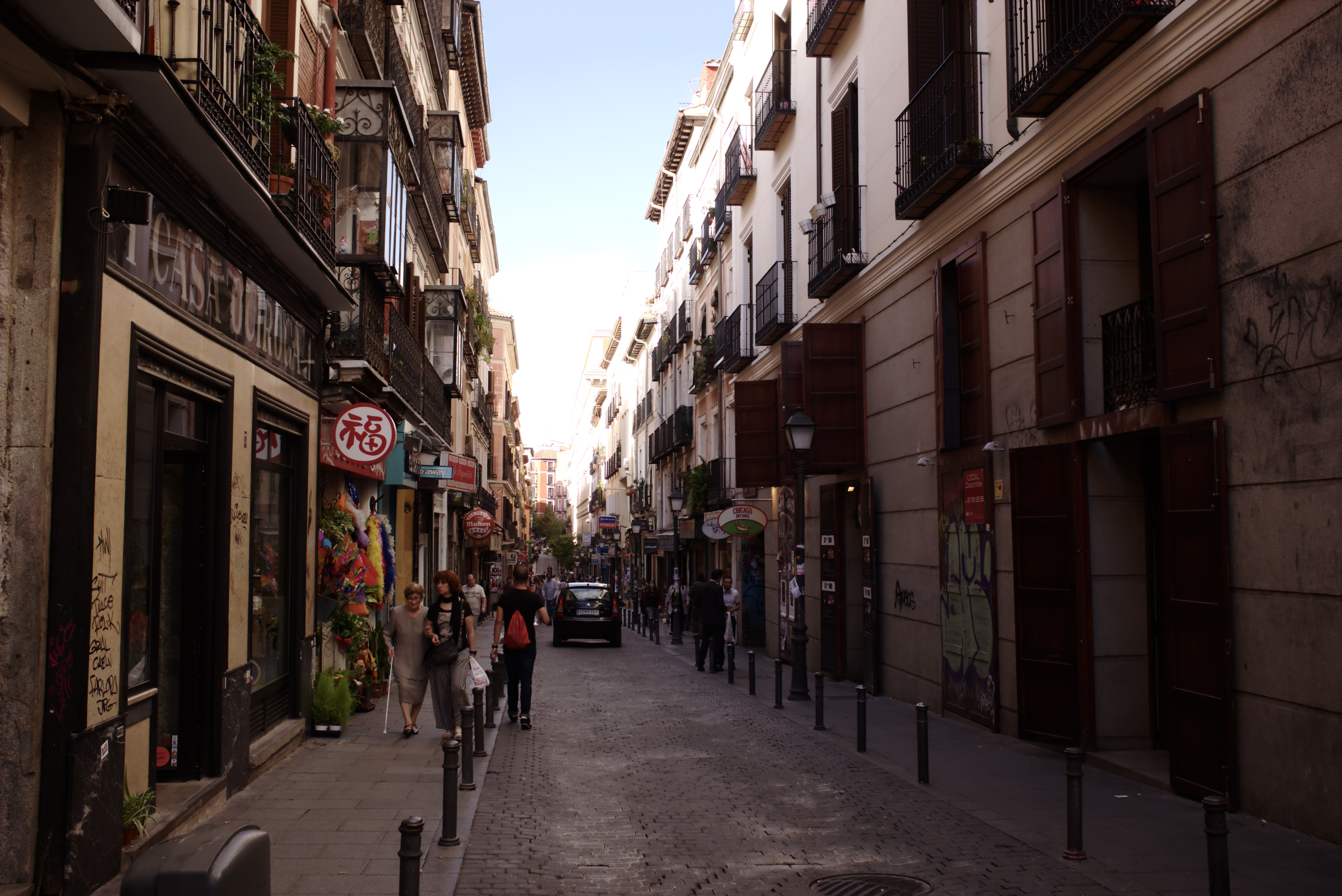 Malasaña